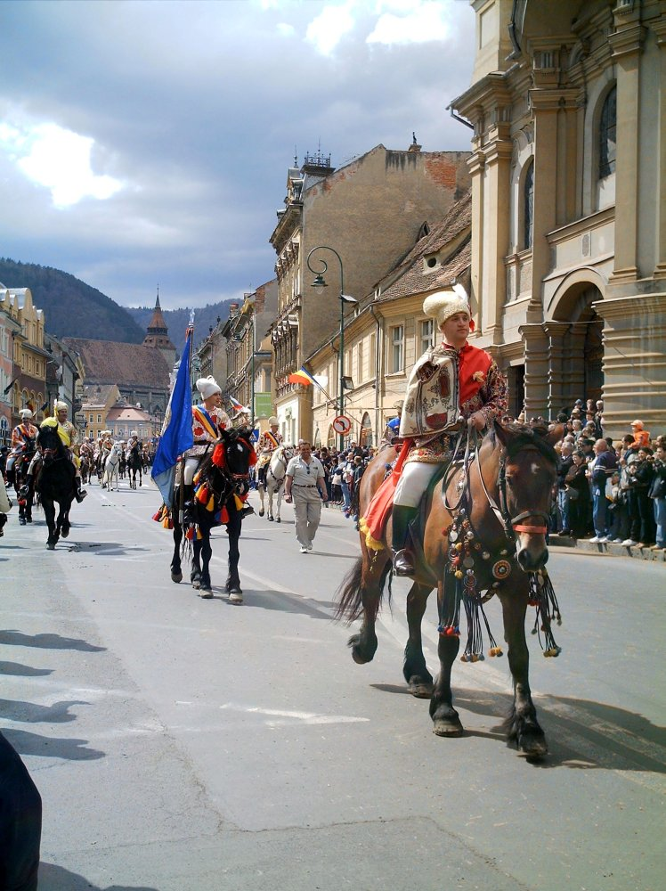 Junii Albiori - vătaful şi stegarul